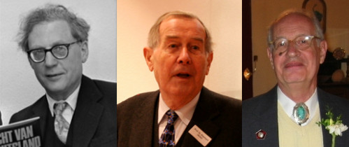 Trevor-Report, Jäckel and Weinberg